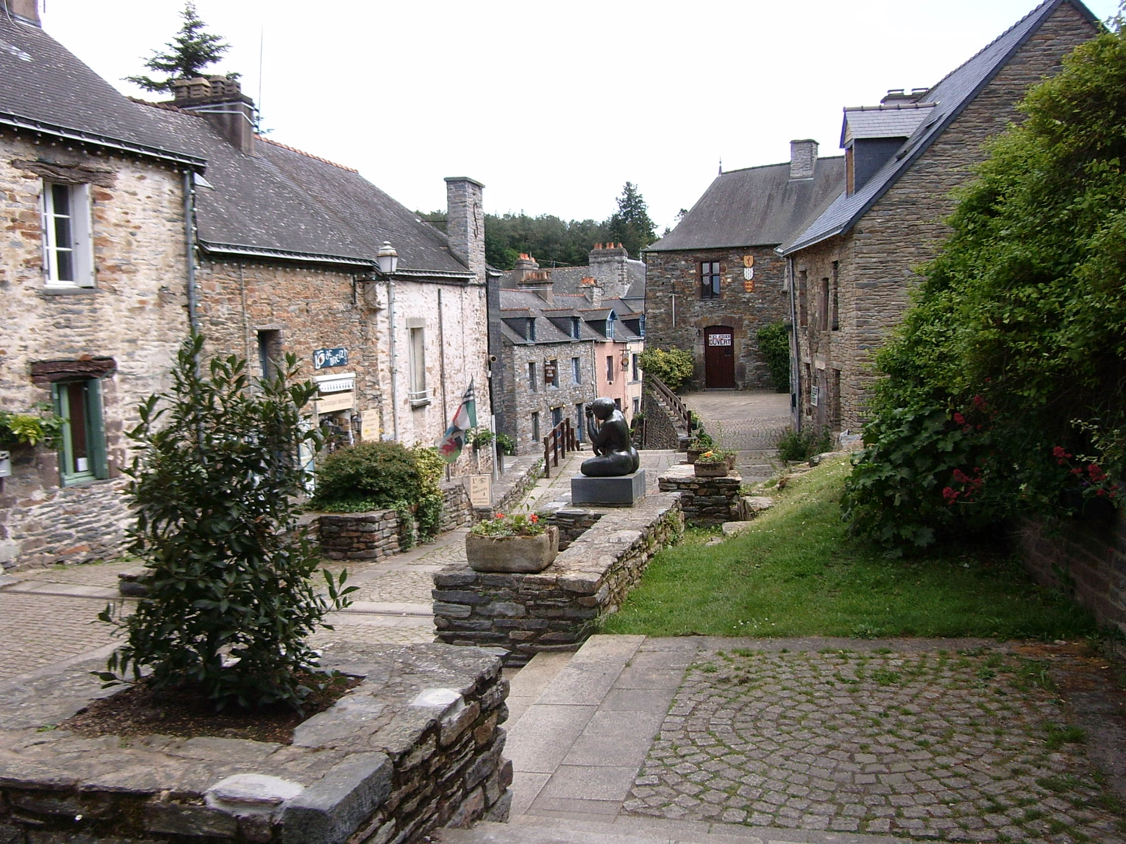 Das Viertel der Kusthandwerker in La Gacilly, Bretagne, Frankreich